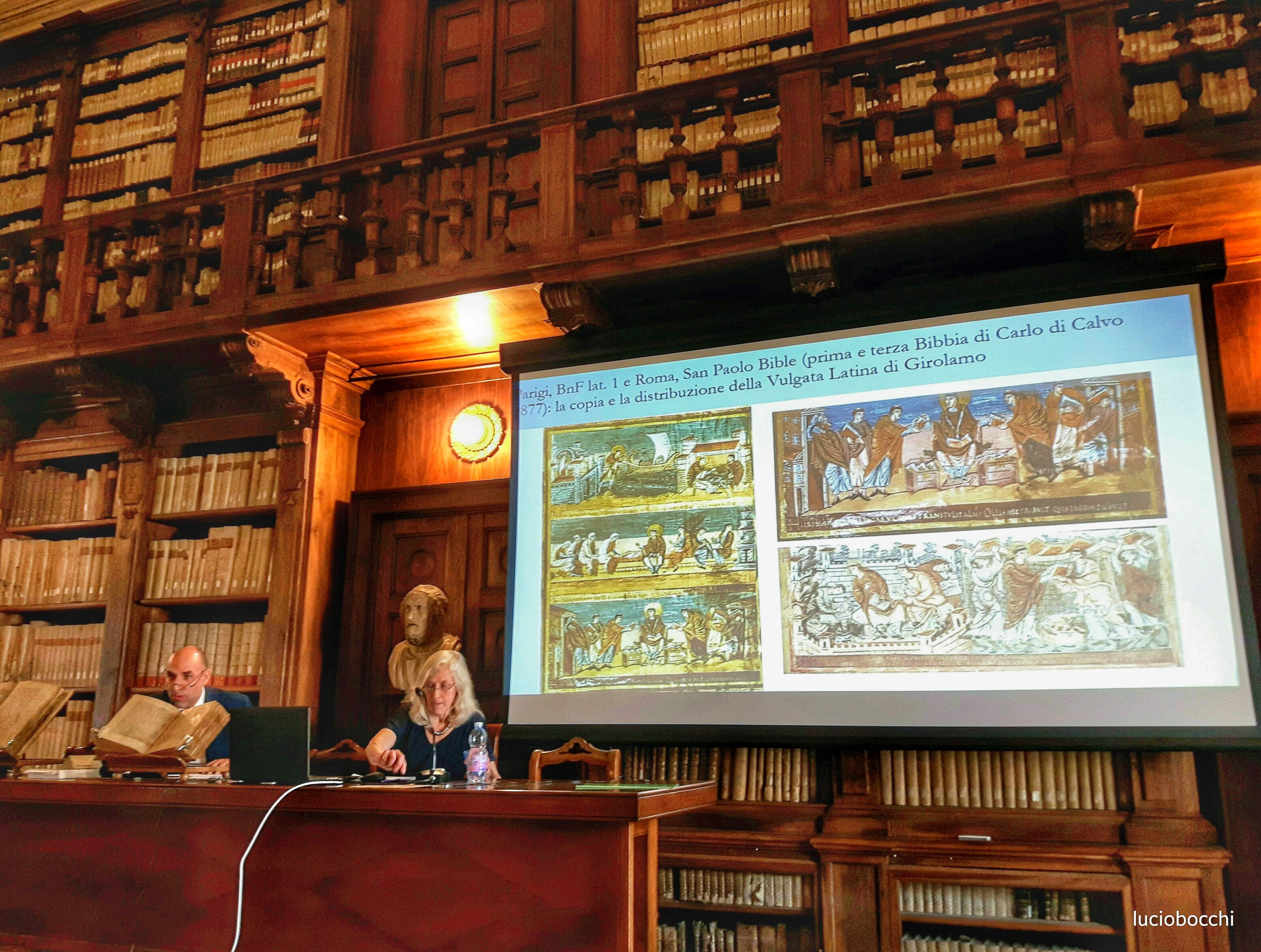 La Biblioteca capitolare di Verona è una delle più antiche biblioteche del mondo e tra le più importanti nel suo genere in Europa. Tra le sue mura molti studiosi hanno trascorso mesi di formazione, svolgendovi importanti ricerche. La biblioteca si trova nella zona medievale di Verona, vicino al ponte Pietra ed al Duomo di Verona.